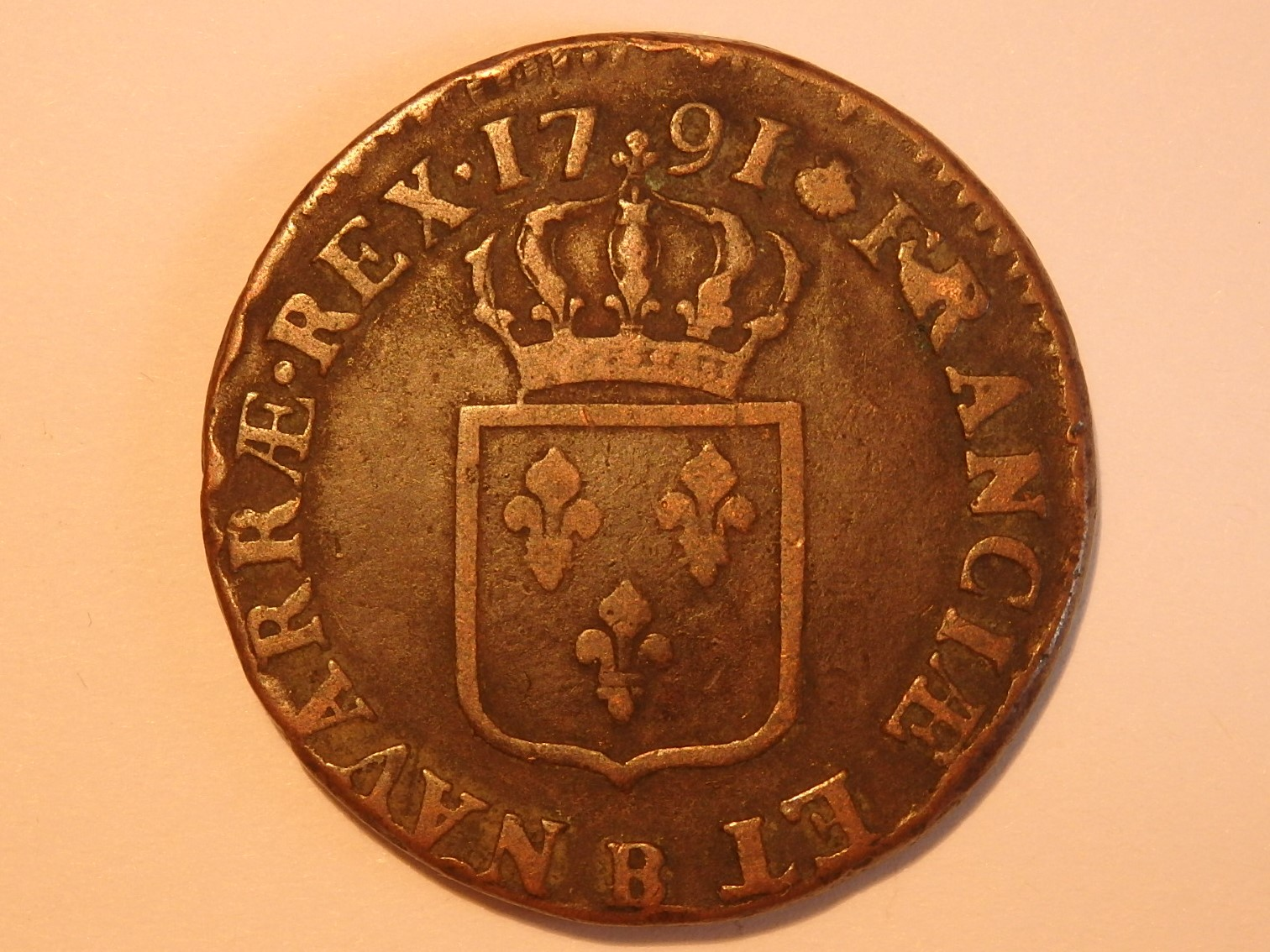 Rückseite der Münze Ludwigs von 1791